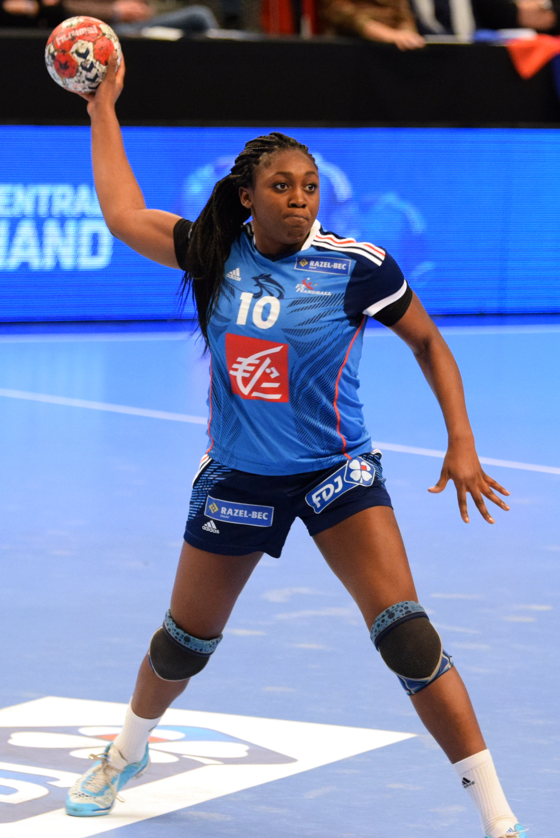 Grâce Zaadi Le 29 novembre 2015, lors du match France / République Tchèque pour le compte du TIPIFF 2015. Au stade Pierre de Coubertin à Paris.